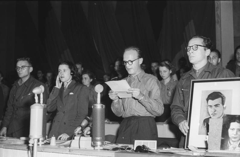 ADN-ZB/Sturm IV. Parlament der Freien Deutschen Jugend in Leipzig 1952 (30.5.52) Heinz Lippmann, Sekretär des Zentralrates der FDJ verliest einen Brief der Mutter des ermordeten griechischen Freiheitshelden Belojannis. Rechts Erich Honecker mit einem Bild von Belojannis. 2.v.l. Raymonde Dien. Information added by Wikimedia users.